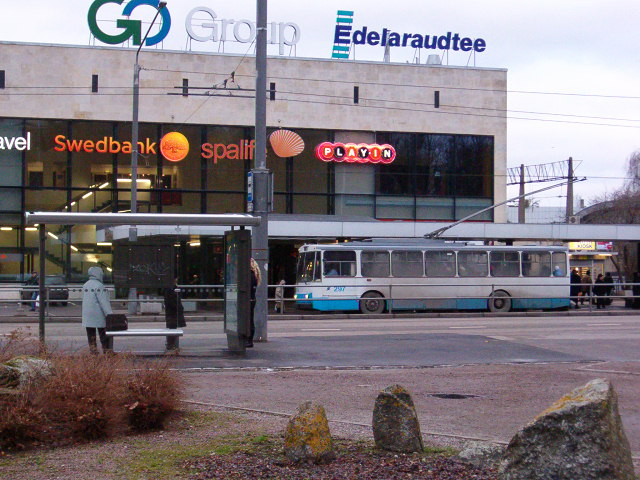 Trolliliini lõpp-peatus. Balti jaam, Toompuiesteel.